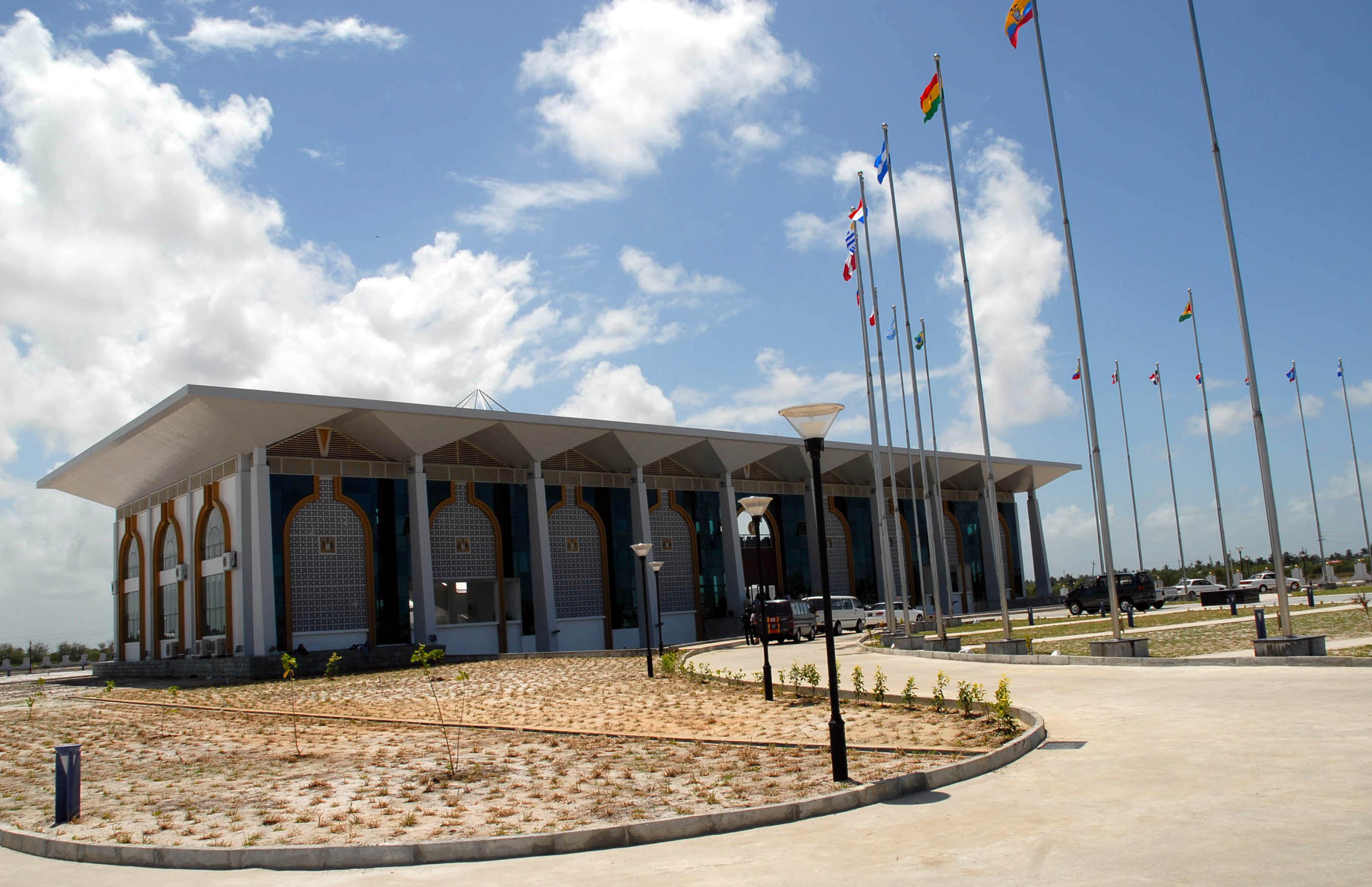 Georgetown, Guiana - Centro de Conferências Internacionais da Guiana, local onde será realizada a XIX Reunião do Grupo do Rio.